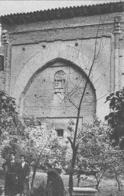 Huelgas Reales. Arco Mudéjar - Valladolid - España Turística y Monumental / Cuarto álbum / Las Bellezas de Castilla / Región Leonesa - Cromo 50 x 70 Sepia